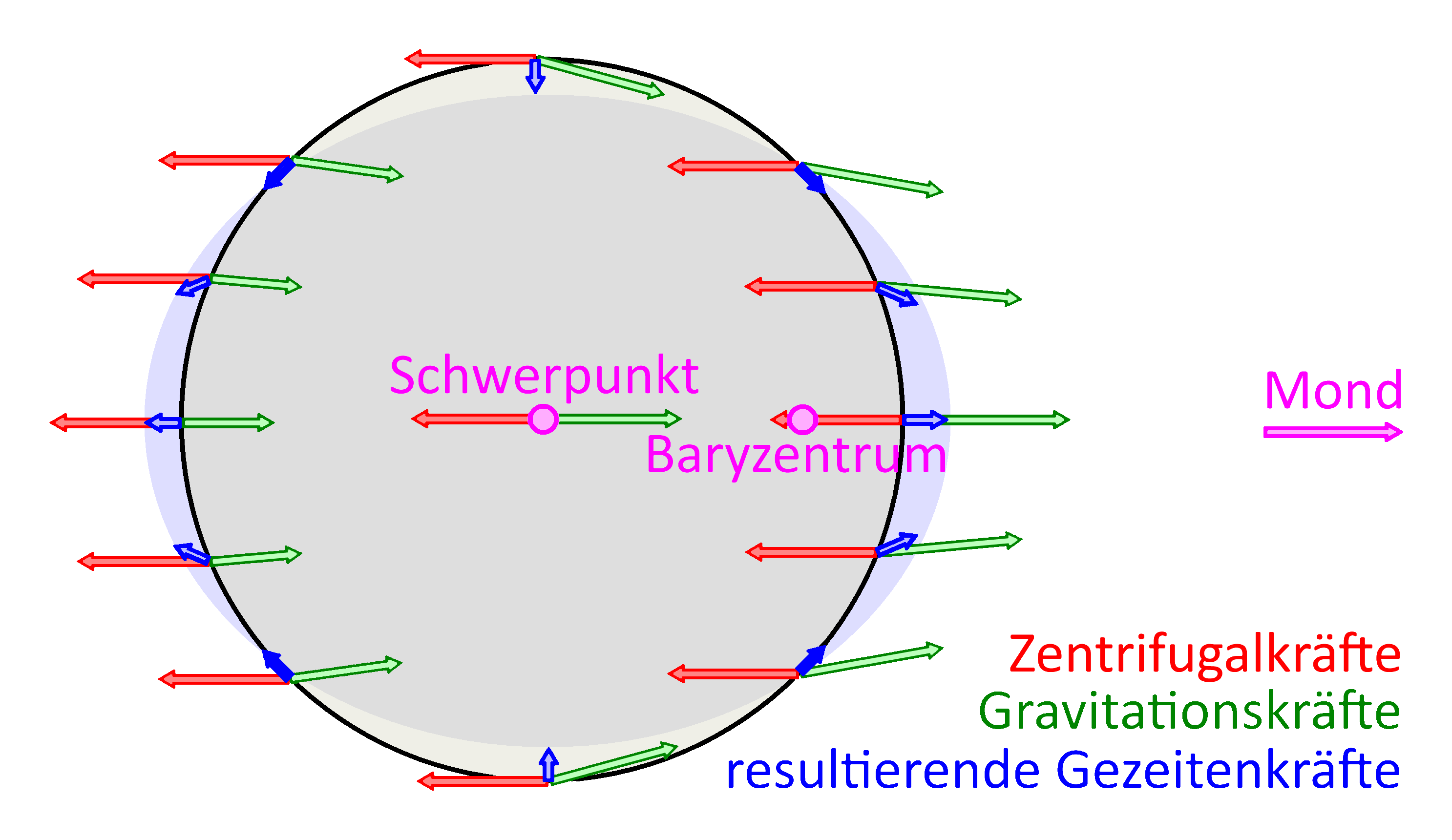 Erdoberfläche: vom Mond verursachte Gezeitenkräfte als Resultierende aus Gravitations- und Zentrifugalkräften